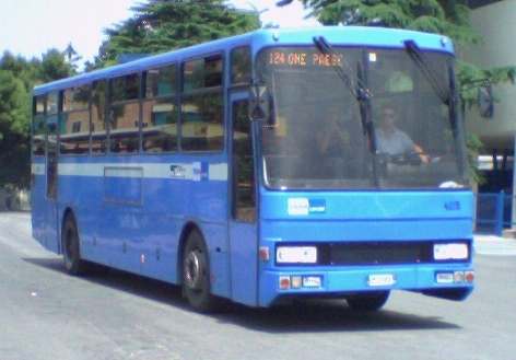 Inbus I330 De Simon della TRAM Servizi di Rimini n. 4115 sulla linea 124